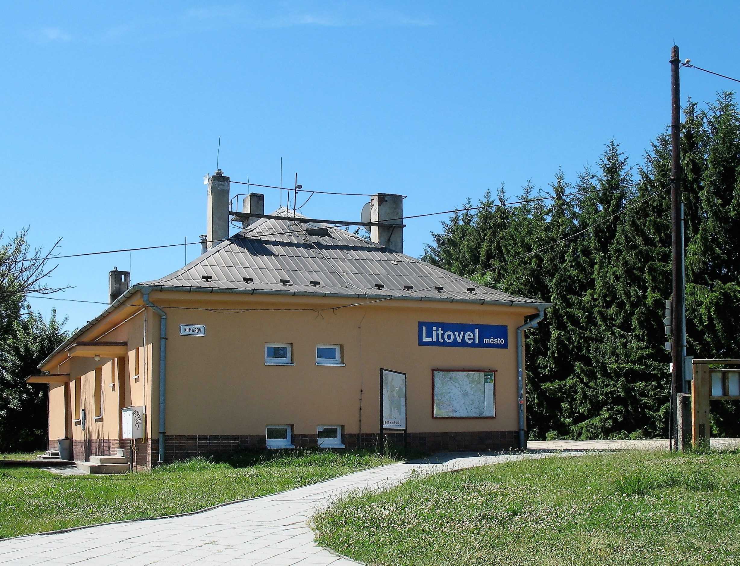 Budova zastávky Litovel město na trati 273